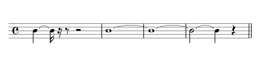 Description : Liaison de prolongation Source : Personnelle Licence : GFDL